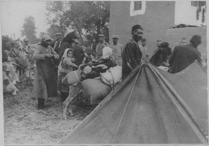 Village of Leskovitsi_or_Leptokariai, Greece